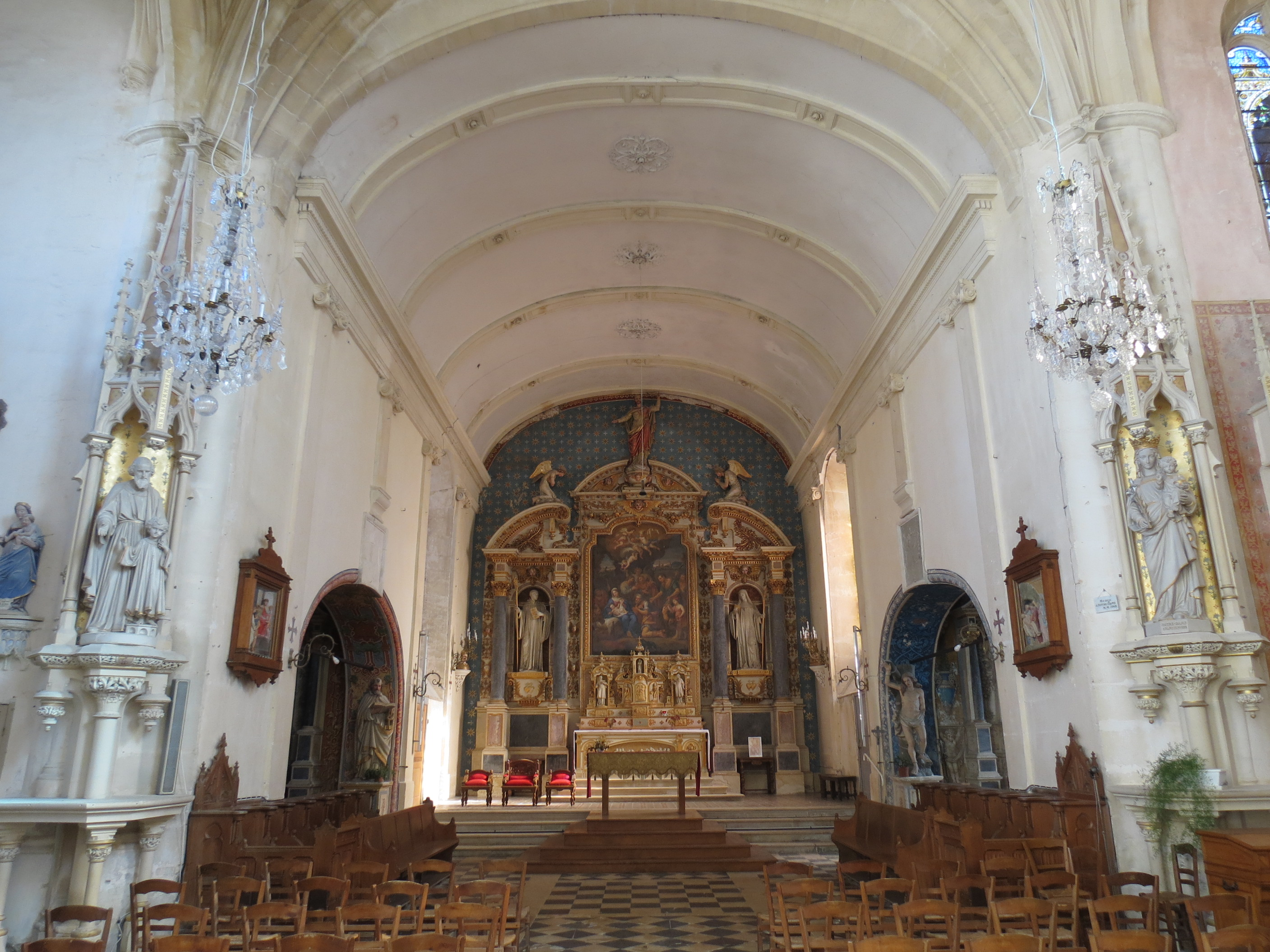 Intérieur de l'Abbaye d'Almeneches, vue du choeur